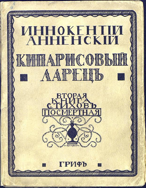 Обложка посмертного сборника Иннокентия Анненского "Кипарисовый ларец" работы Александра Арнштама (1910)